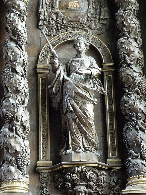 Statue de Sainte-Marguerite-de-Hongrie au retable de l'ancienne chapelle des Minimes de Saint-Pol-de-Léon (29).